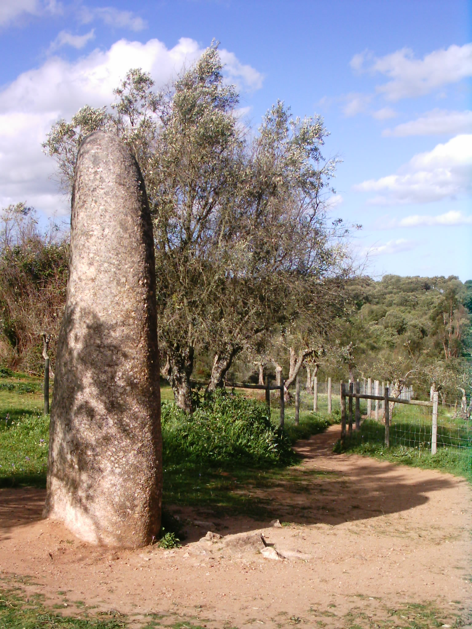 Menir dos Almendres, Évora, Portugal.